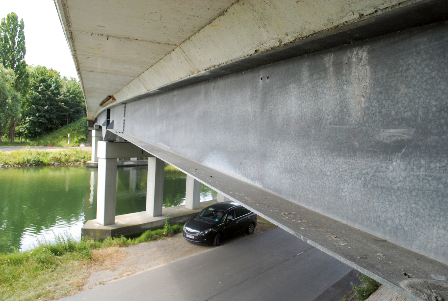 Feuerverzinkte Stahl-Verbund-Brücke über die Lier